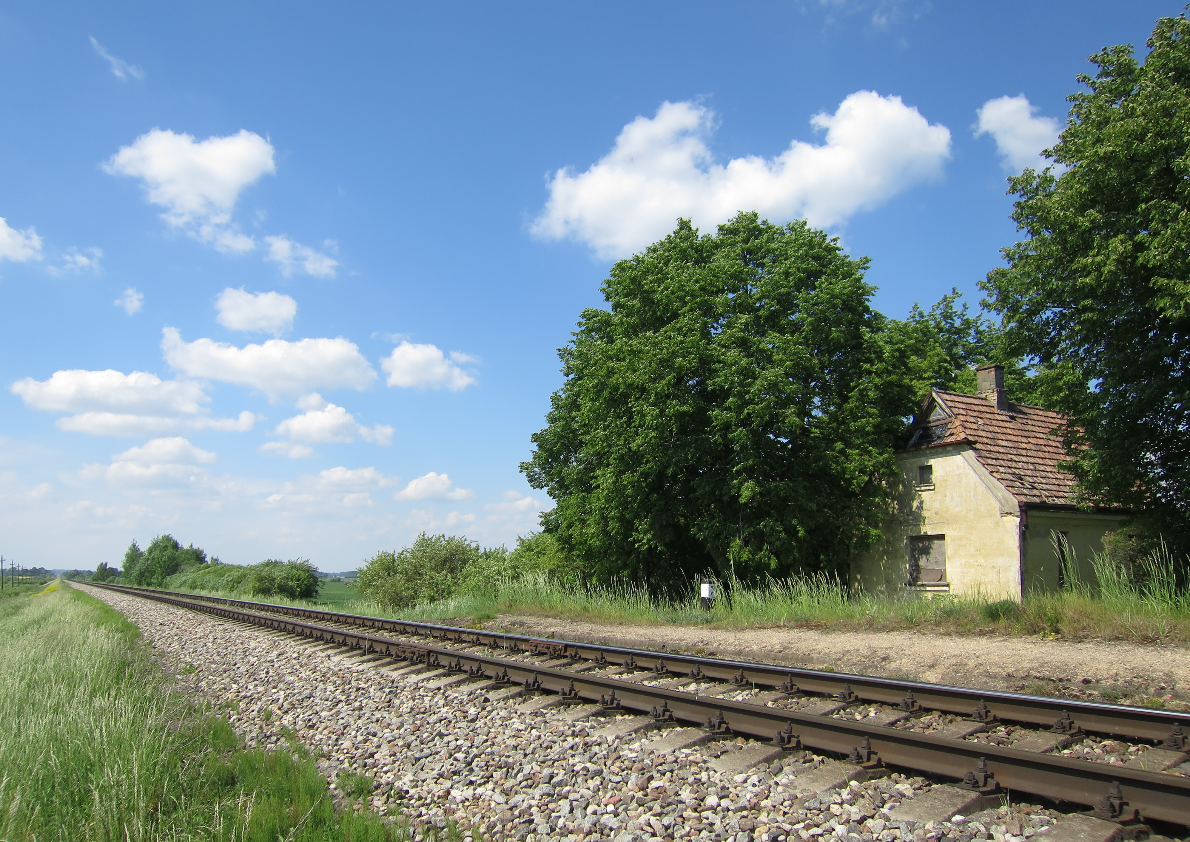 Lāču pieturas punkts